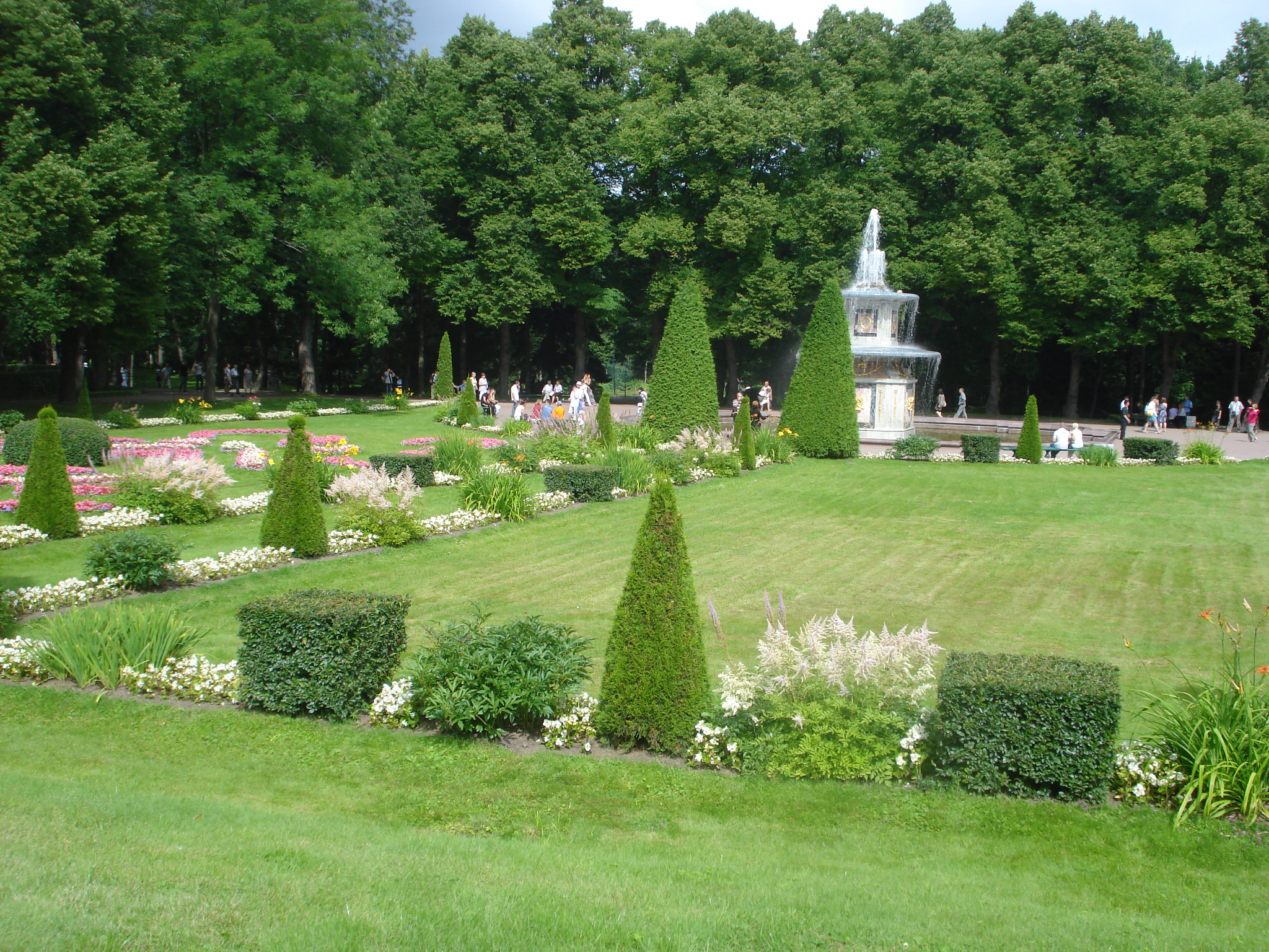 Петерхоф код С. Петербурга. 2. август 2009. Снимио: Јакша П.